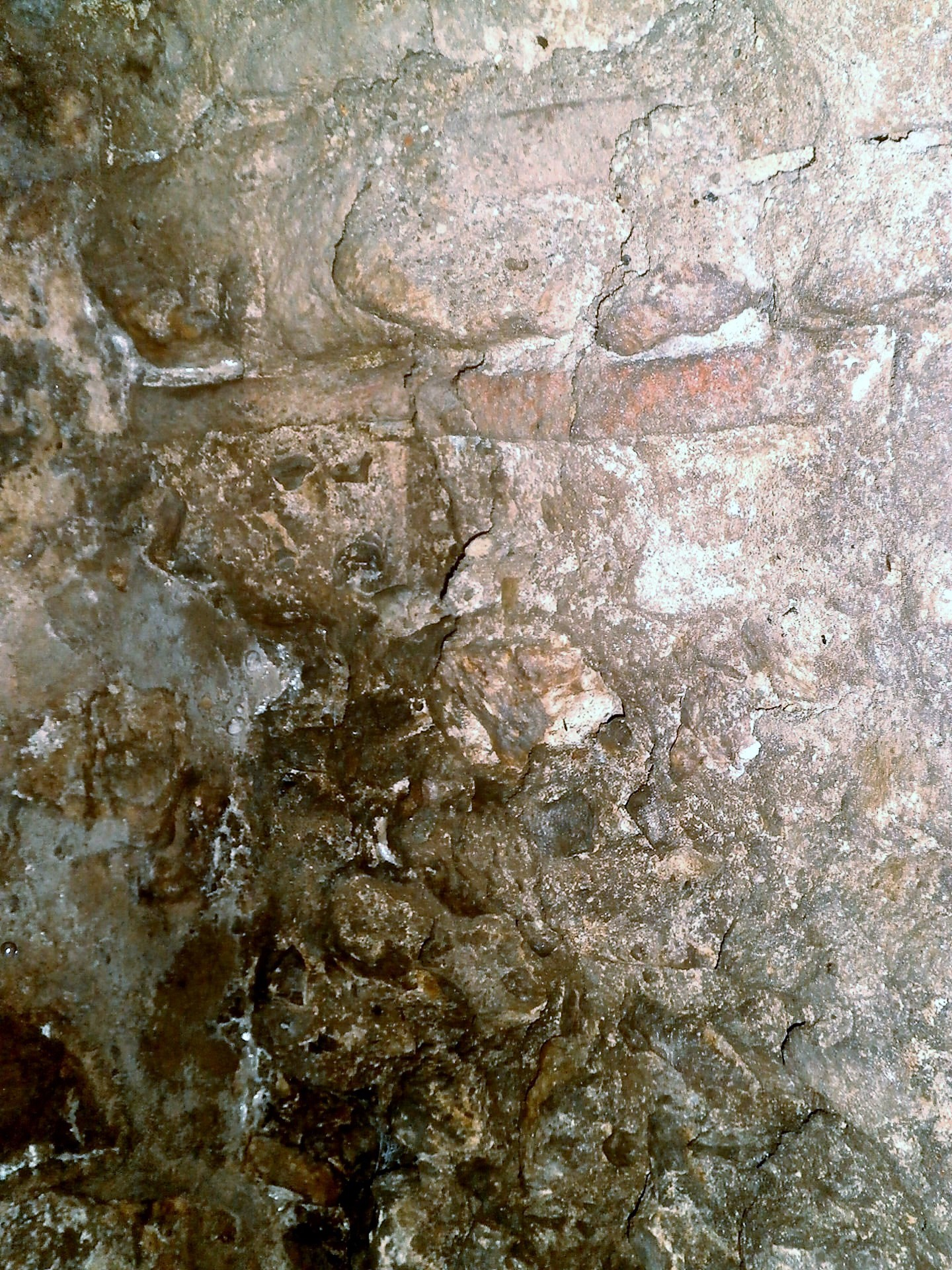 détail architectural du vomitoire ouest